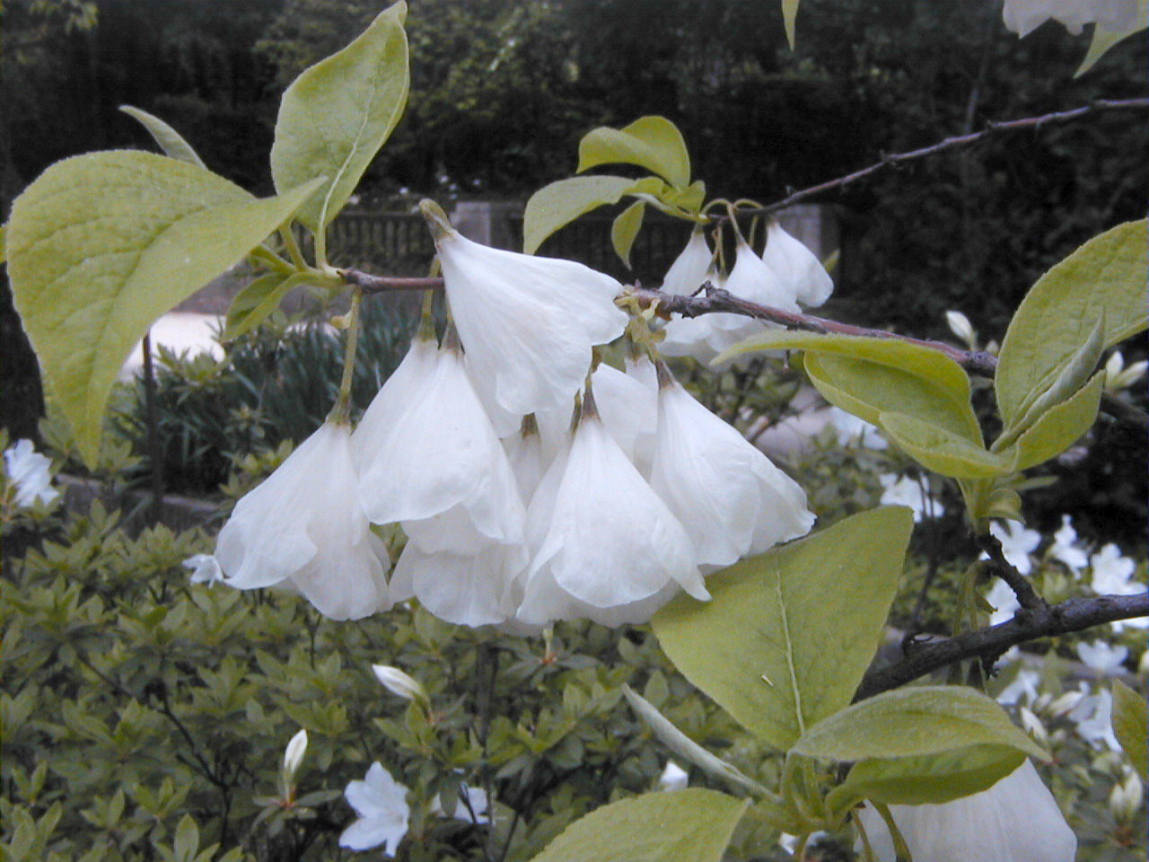 Halesia monticola. Real Jardín Botánico, Madrid.